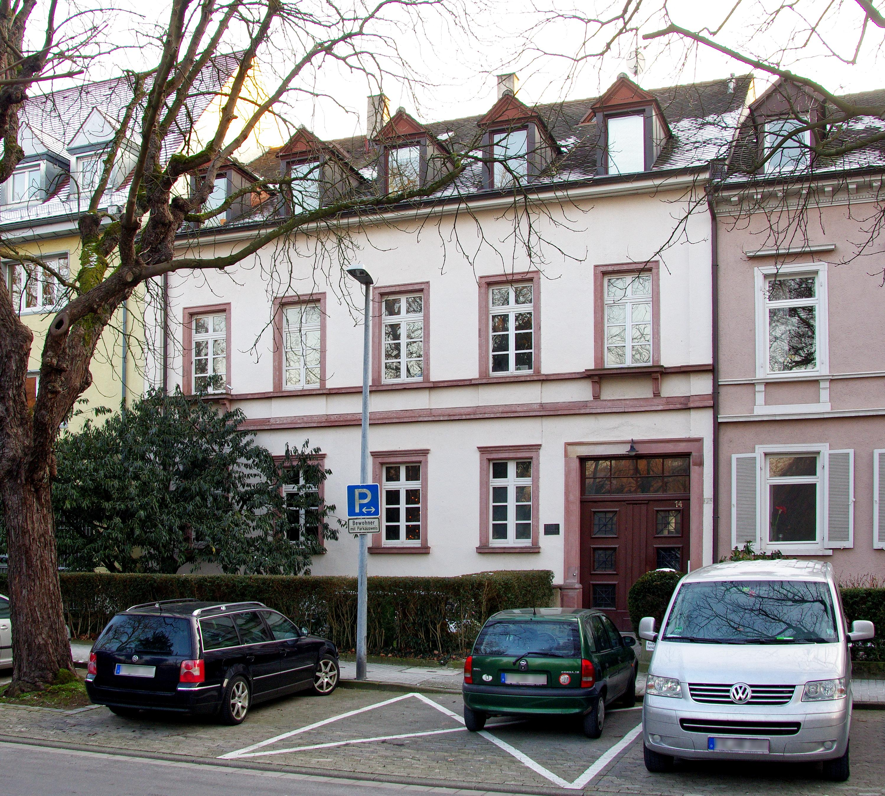 Corps Hasso-Borussia Erasmusstraße 14 D-79098 Freiburg i. Br.